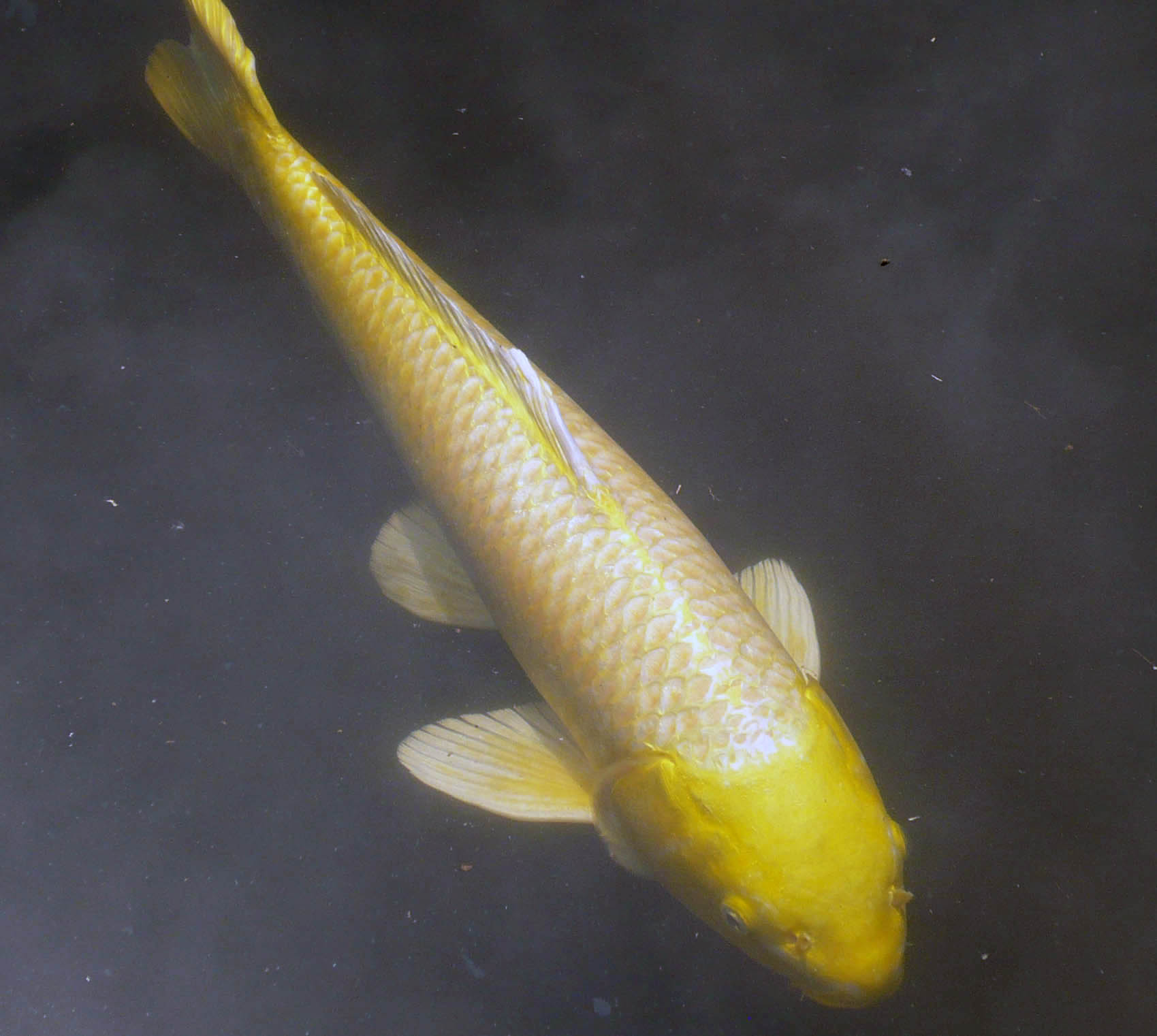 鯉